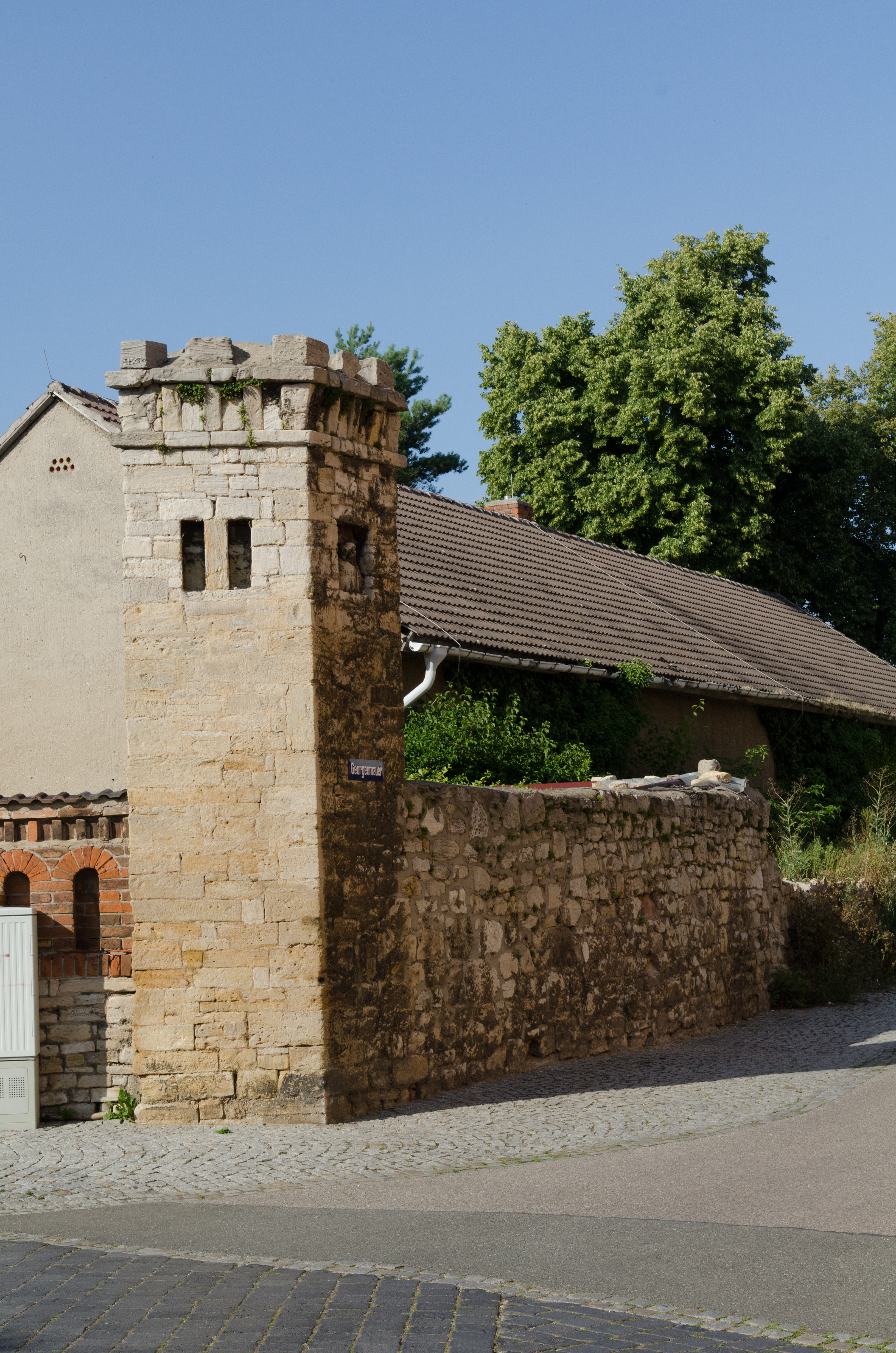 Naumburg, Georgenstraße 5